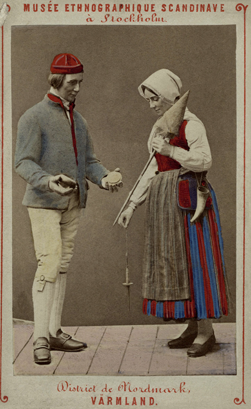 Handkolorerat fotografi av man och kvinna i sockendräkter från Nordmark, Värmland. Skandinavisk-etnografiska samlingen, Stockholm.